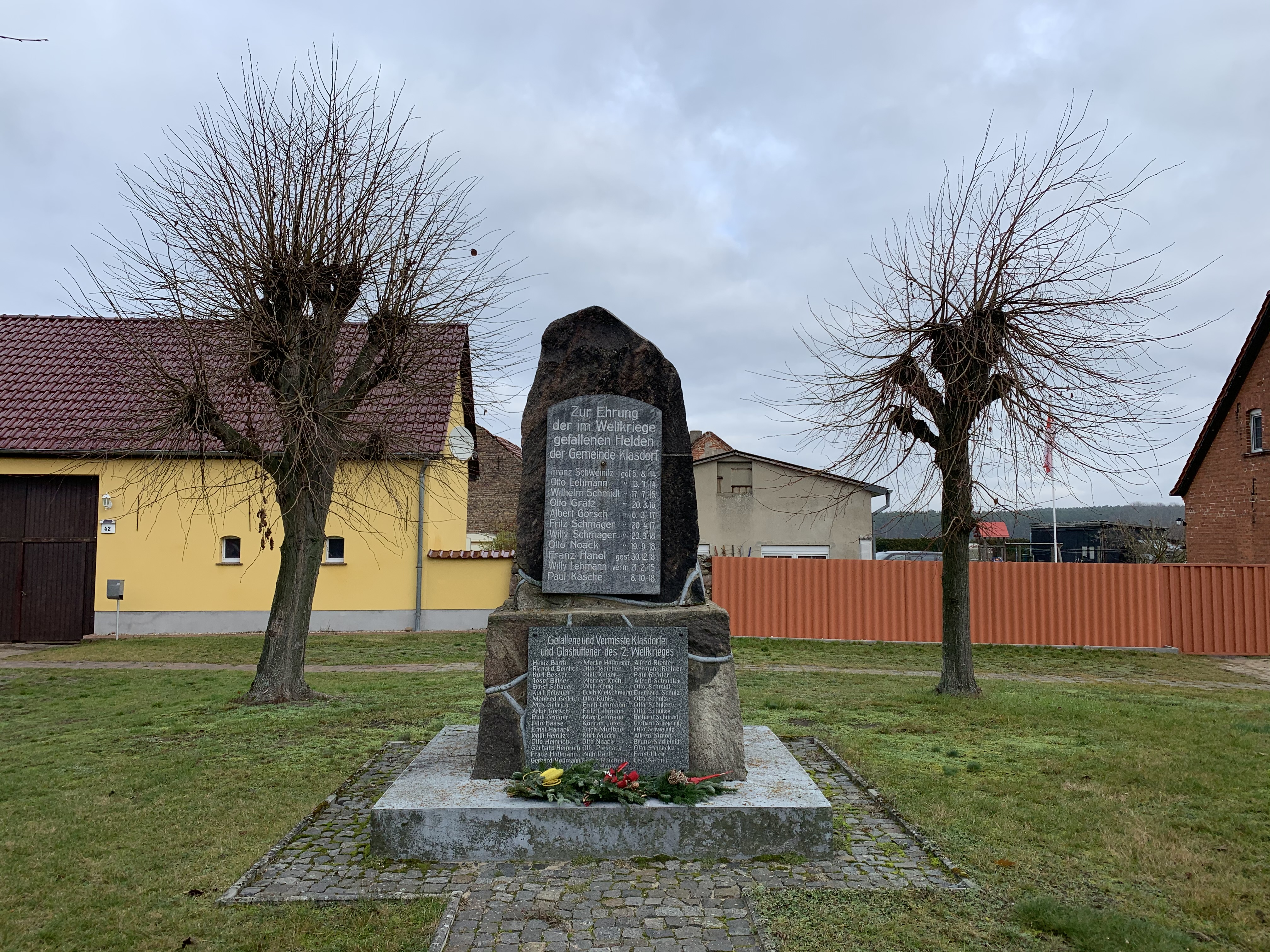 Klasdorf, ein Ortsteil von Baruth/Mark in Brandenburg